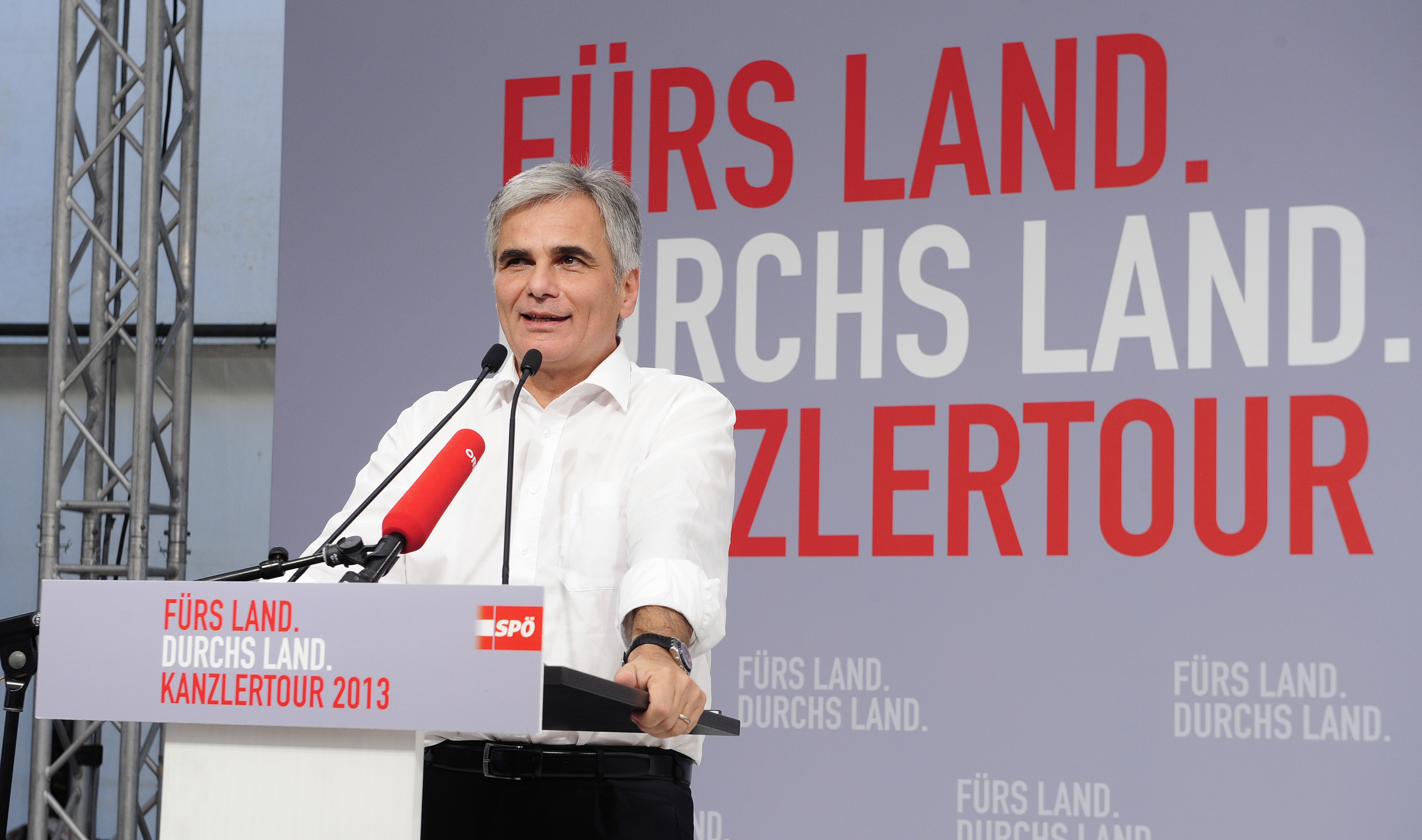 Zu der abschließenden Veranstaltung unter dem Motto 'Fürs Land - durchs Land' kamen mehr als 1.500 Gäste um Bundeskanzler Werner Faymann live zu erleben. (c) Johannes Zinner